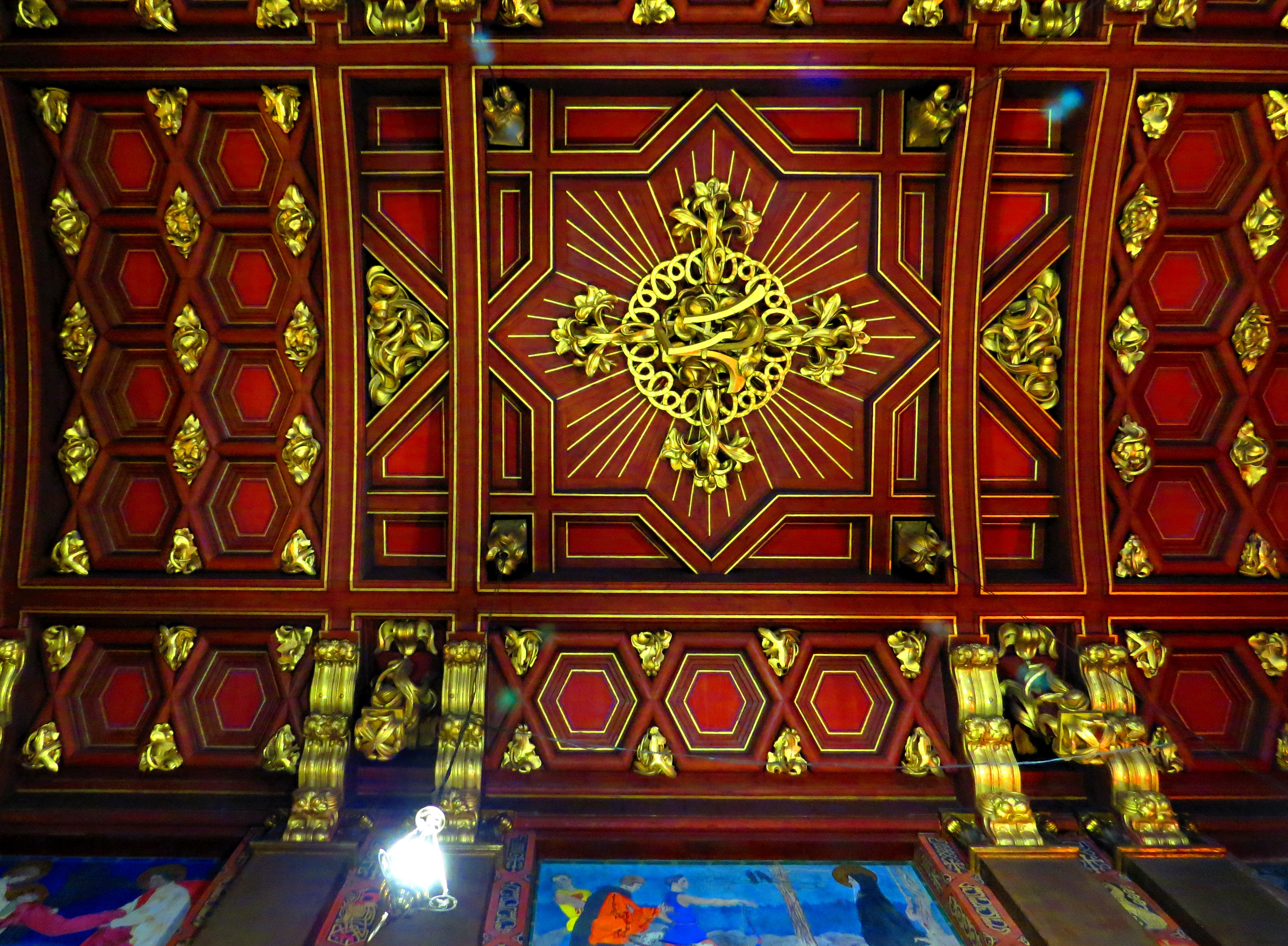 Вірменський собор св. Трійці (1363-1527) - дерев'яна стеля - Львів (Вірменська, 7) Україна